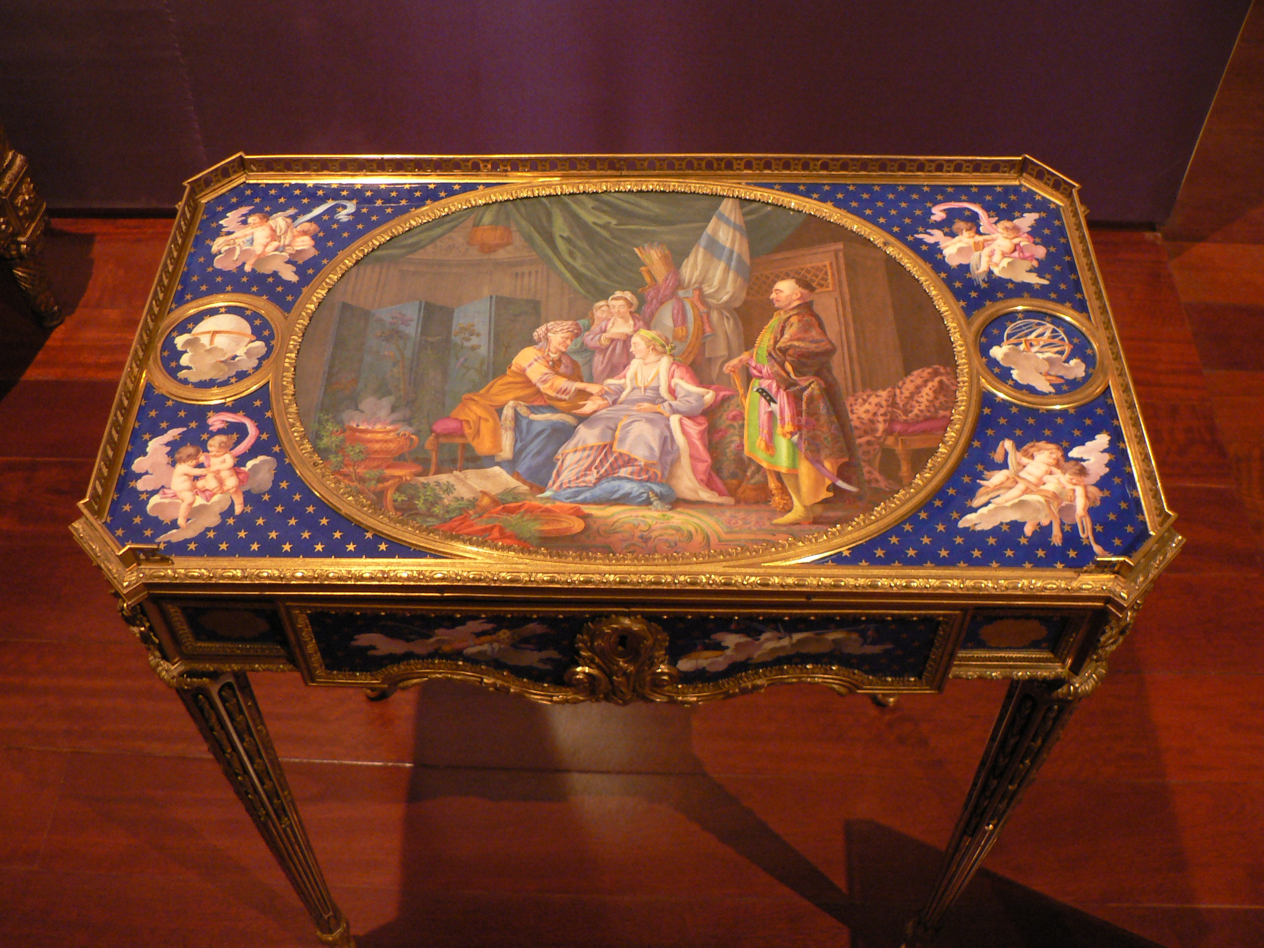 Martin Carlin, Table d'écriture (1772), Paris. Chêne, bois exotiques, porcelaine de Sèvres, laiton et bronze. Photographie prise à la Fondation Calouste Gulbenkian à Lisbonne, Portugal.